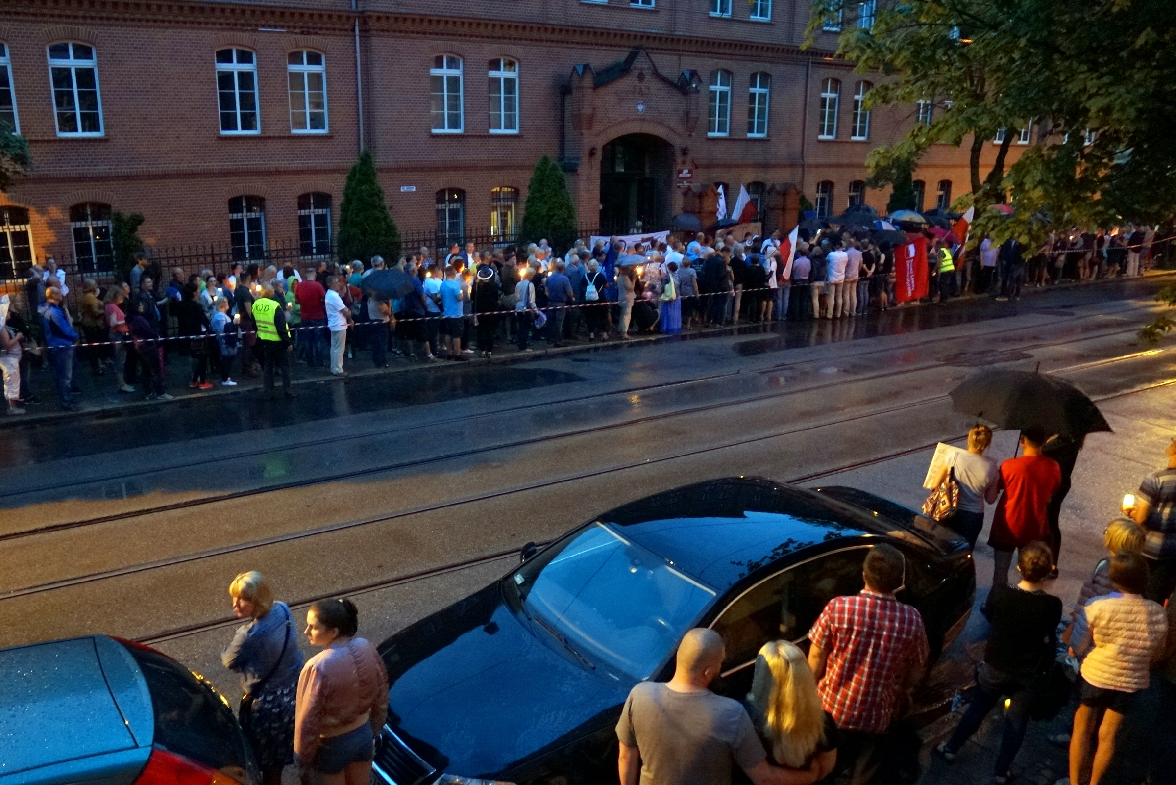 Obywatelski protest „w obronie sądów”, przed Sądem Okręgowym w Gorzowie Wlkp. (lipiec 2017 rok)